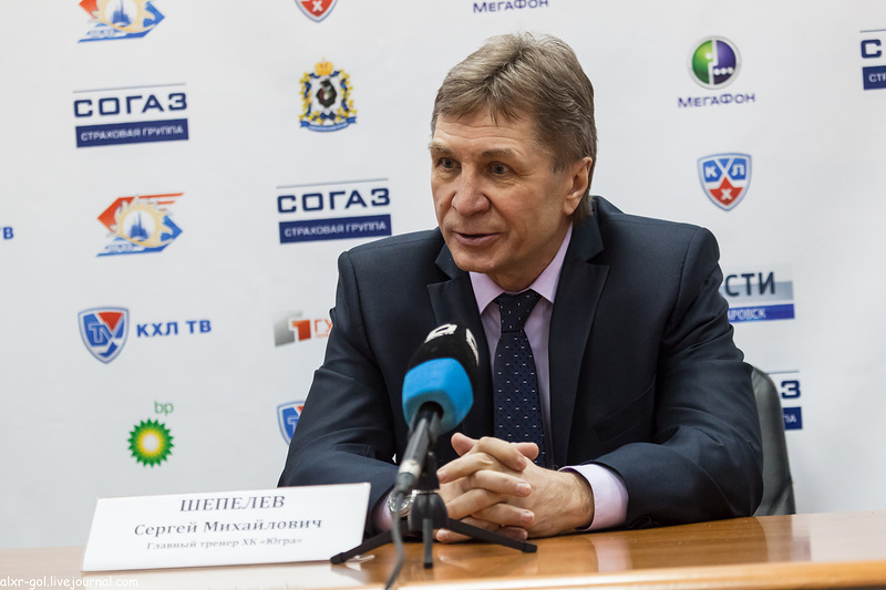 Главный тренер Ханты-Мансийской Югры после игры с Амуром 09.01.13